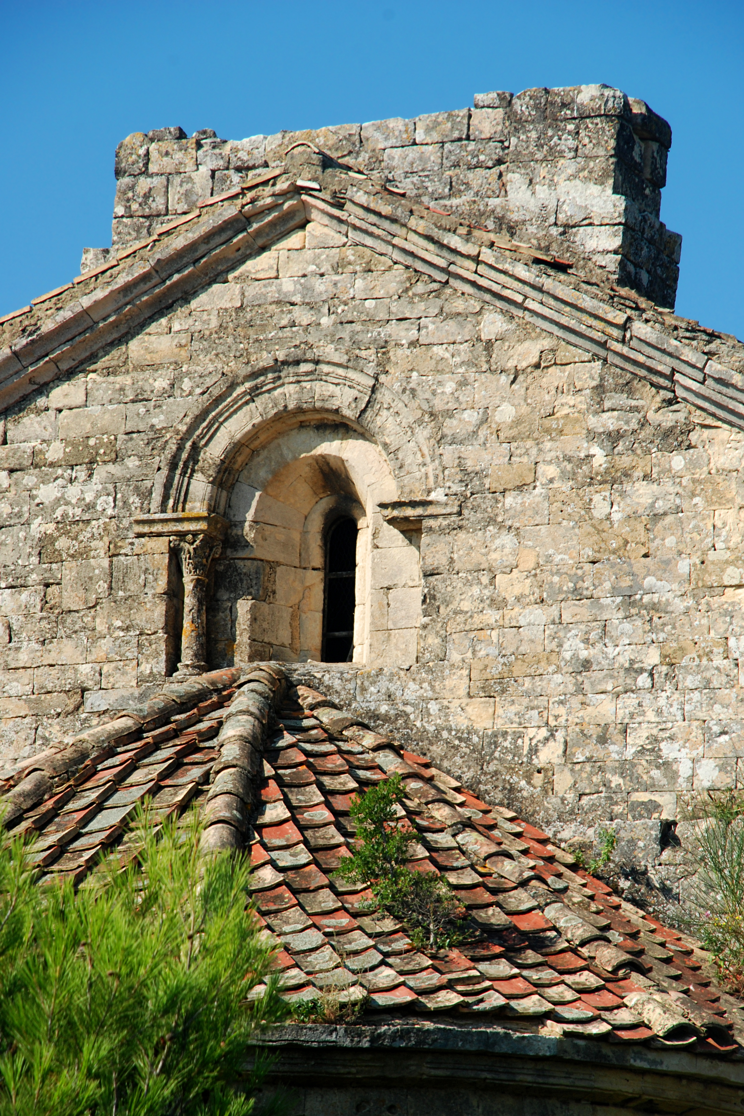 France - Gard - Bagnols-sur-Cèze - Chapelle Saint-Martin-de-Saduran